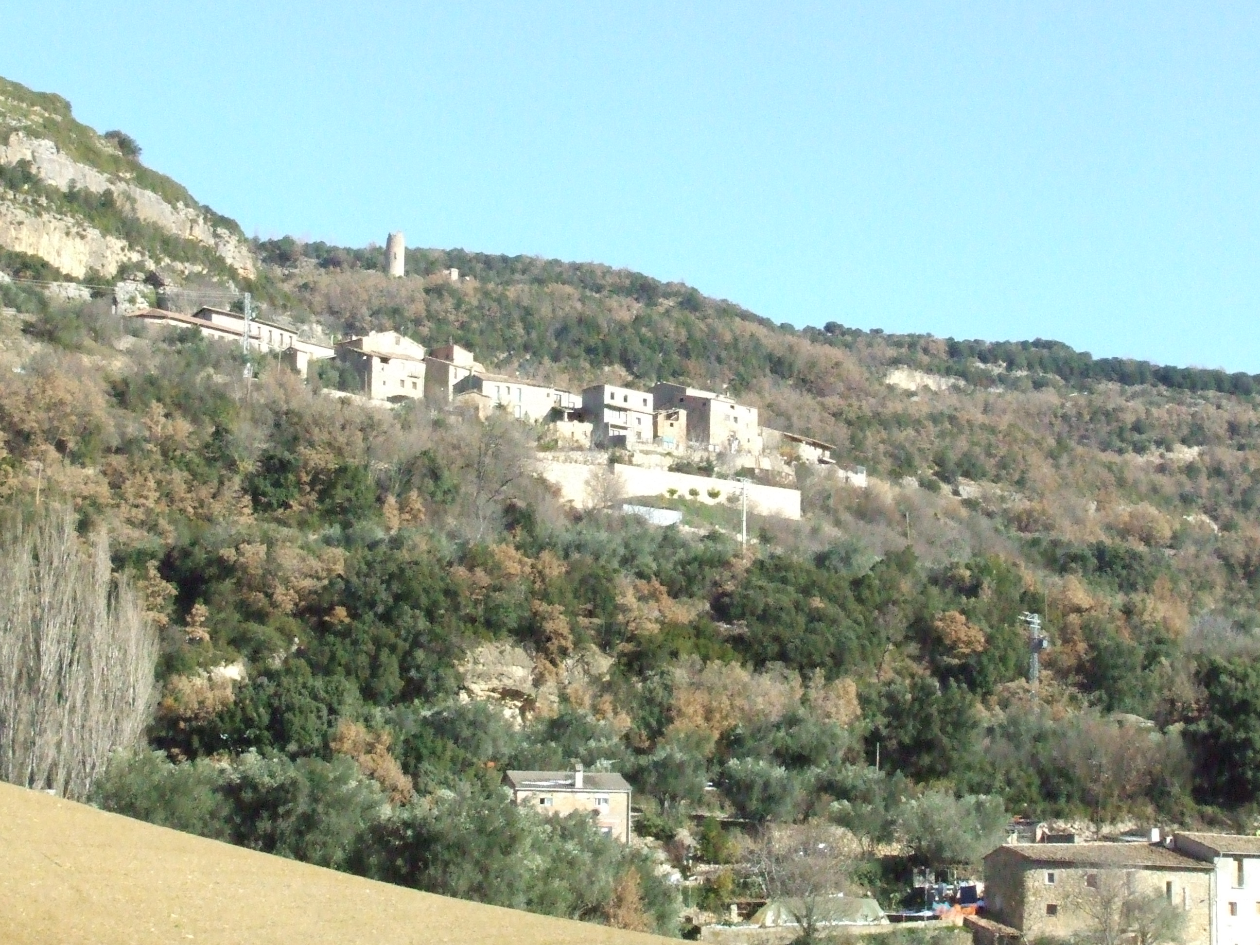 Sant Miquel de la Vall, de la Vall de Barcedana (Aransís, Gavet de la Conca, Pallars Jussà)